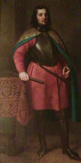 Photographie de la peinture du comte Renaud III de Bourgogne, exposée dans la cathédrale Saint-Jean de Besançon.